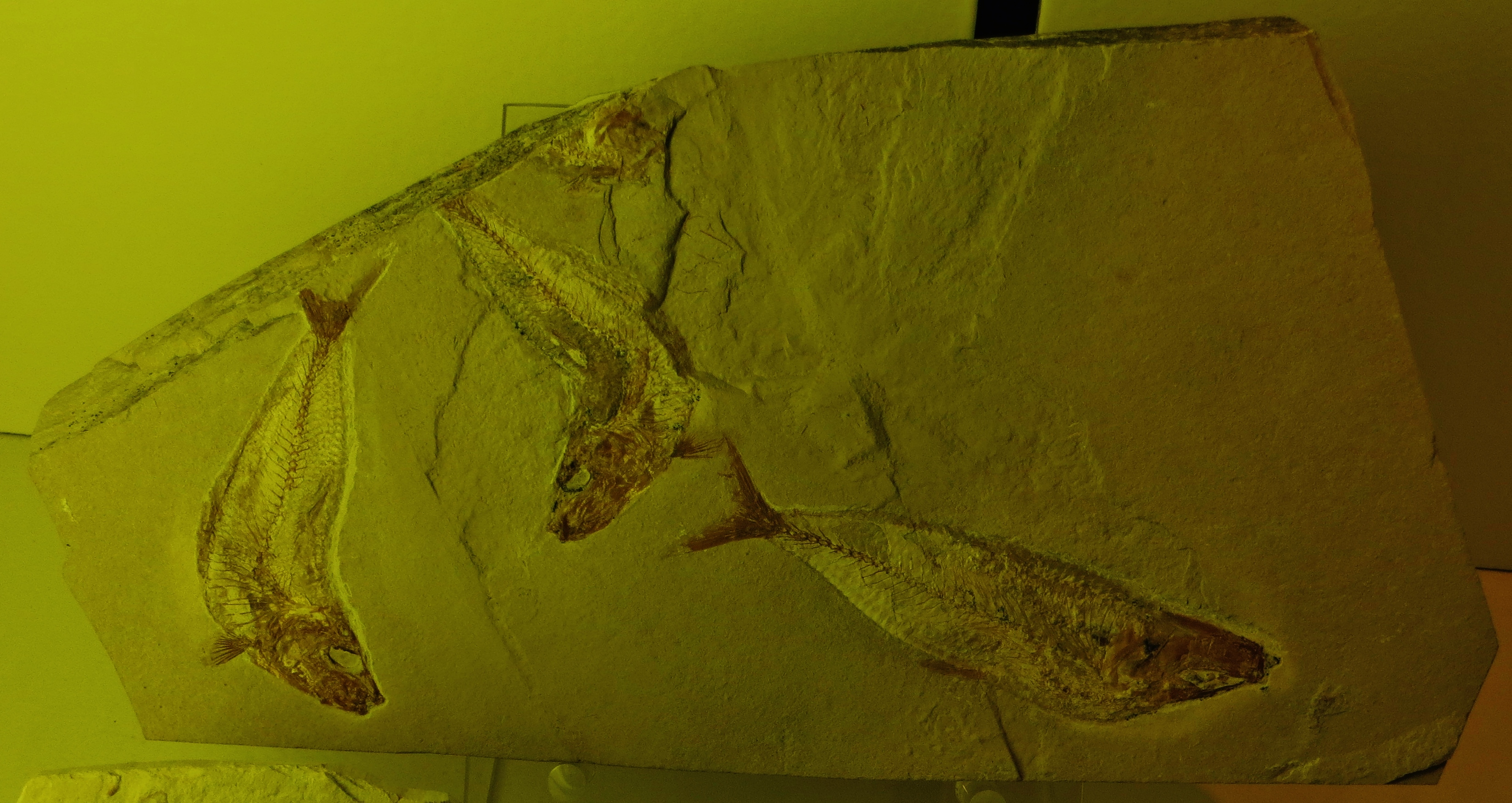 Fossil of Gaudryella- Museo Paleontologico di Montecchio Maggiore